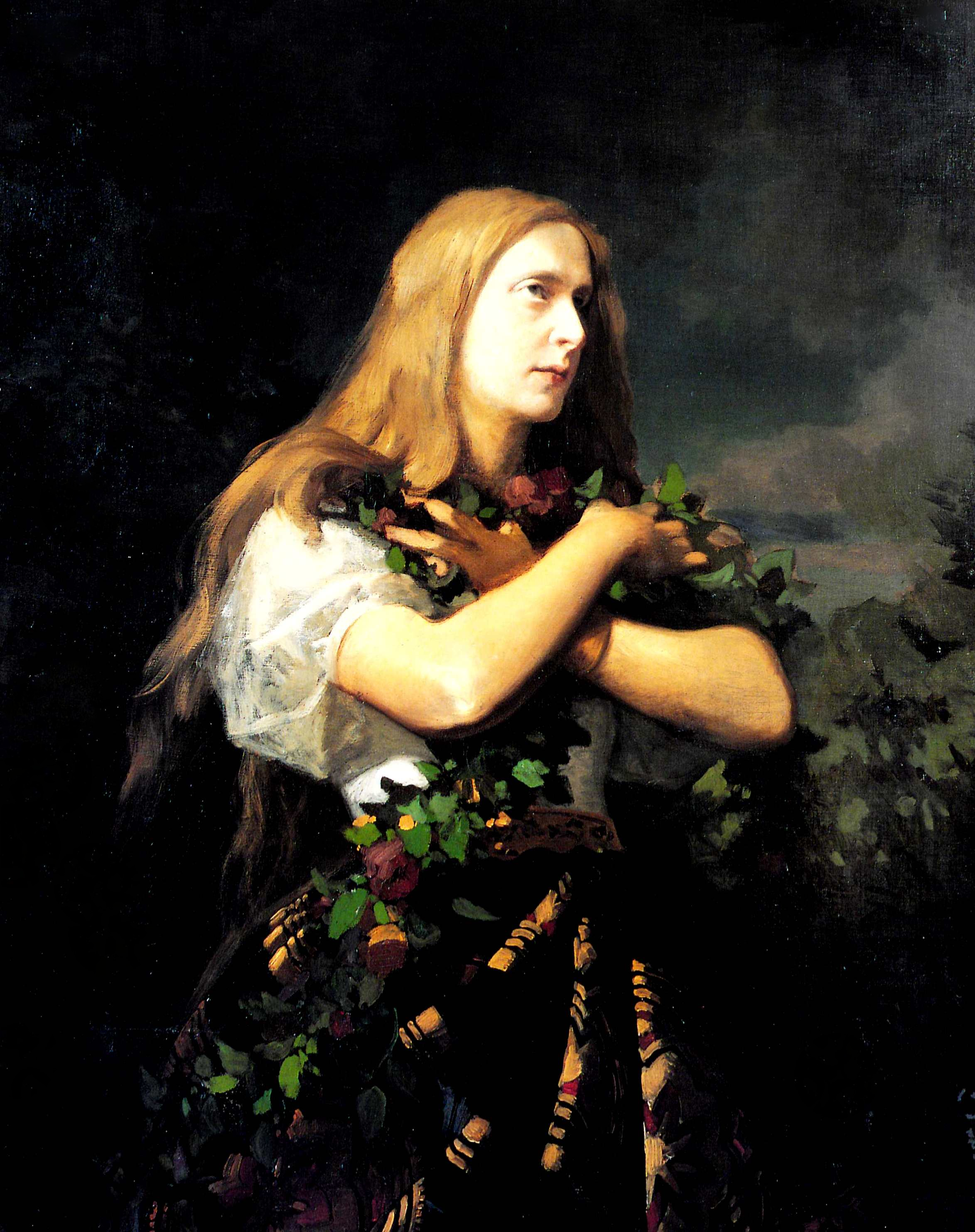 Ofelia